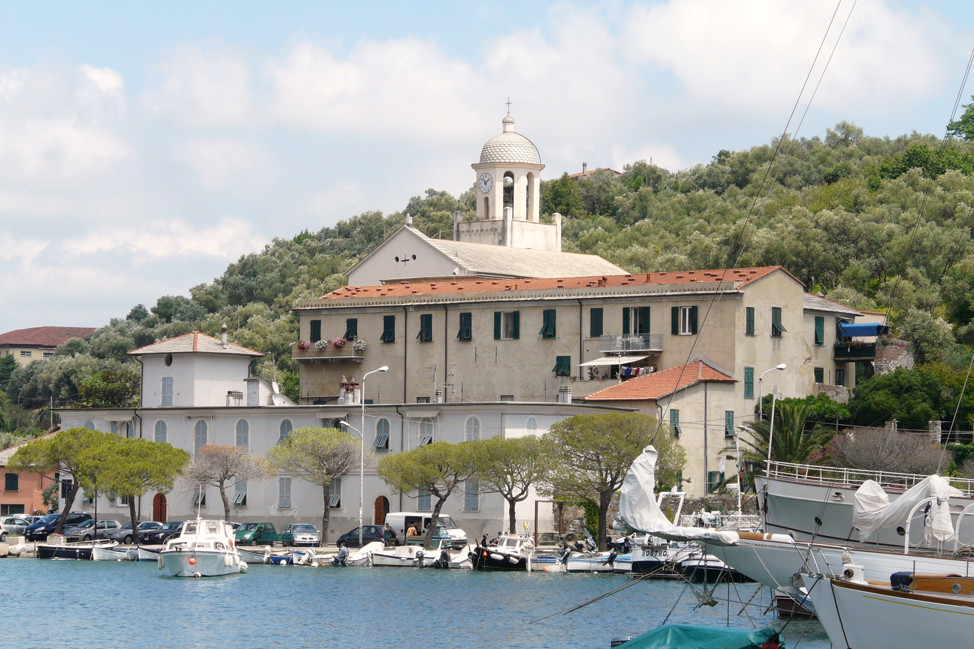 Santuario delle Grazie, Porto Venere, Liguria, Italia